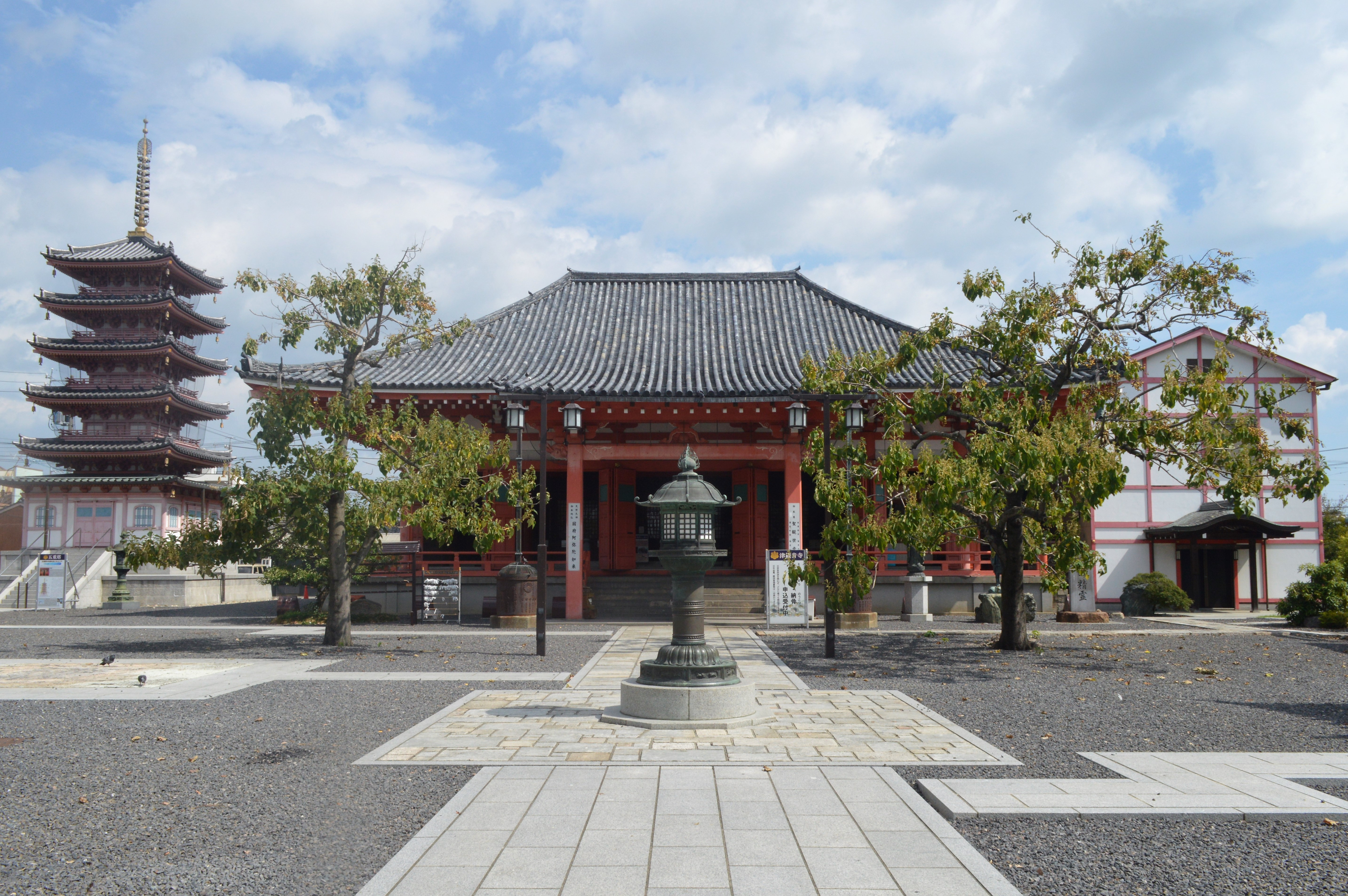 三重県津市にある津観音。